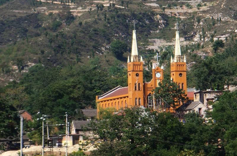 田家井天主教堂